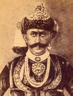 Ganpat Rao Gaekwad